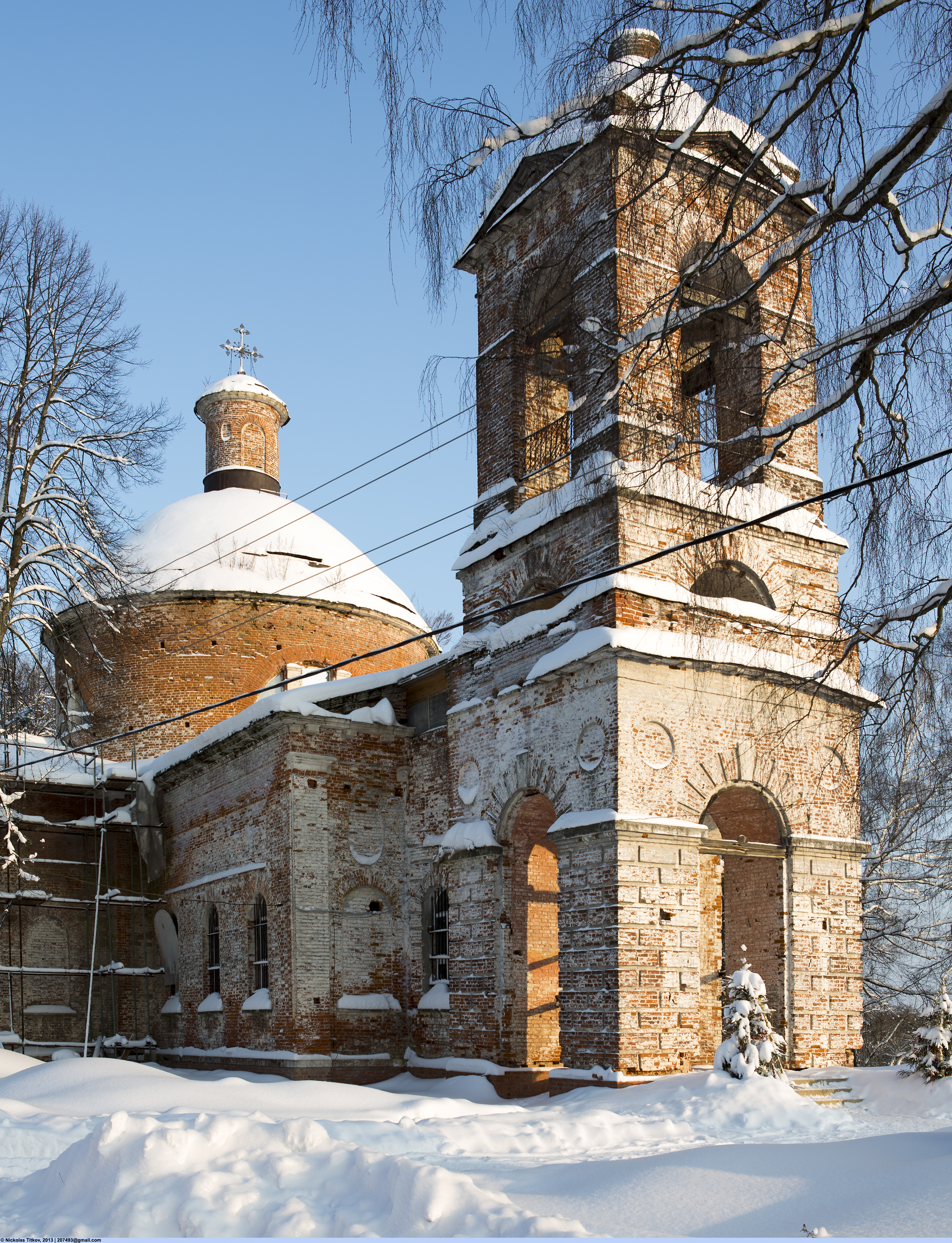 Каменный крестчатый в плане однокупольный храм в стиле классицизма. Построен в 1798–1812 годы, трапезная с колокольней пристроены в 1849 году. Боковые приделы Владимирский и Хрисанфа и Дарьи, в трапезной Михаило-Архангельский и Сергиевский приделы. Закрыт в 1961 году. Возвращён верующим в 1994 году в тяжёлом состоянии, ремонтируется.